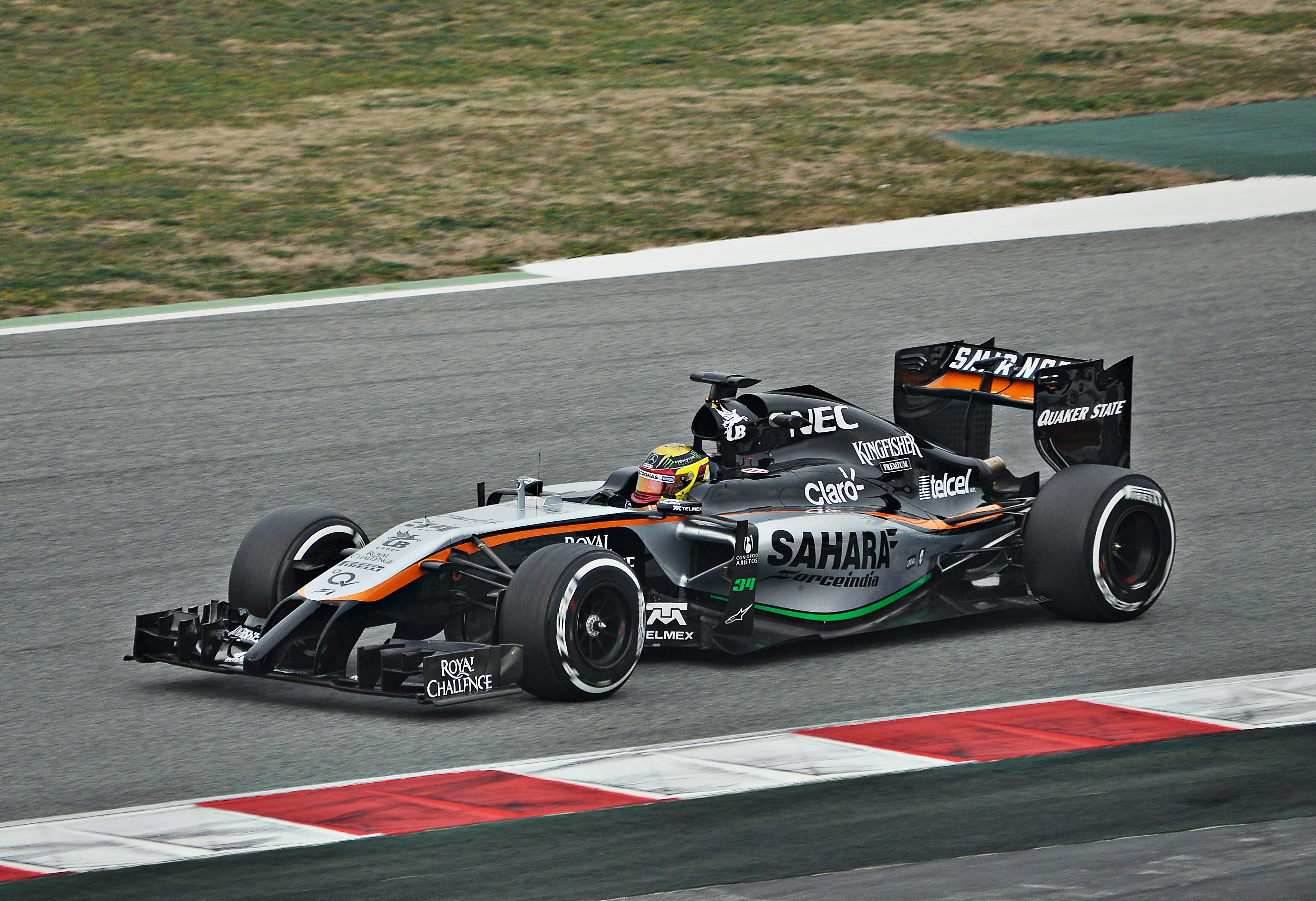 Test days Barcelona 2015